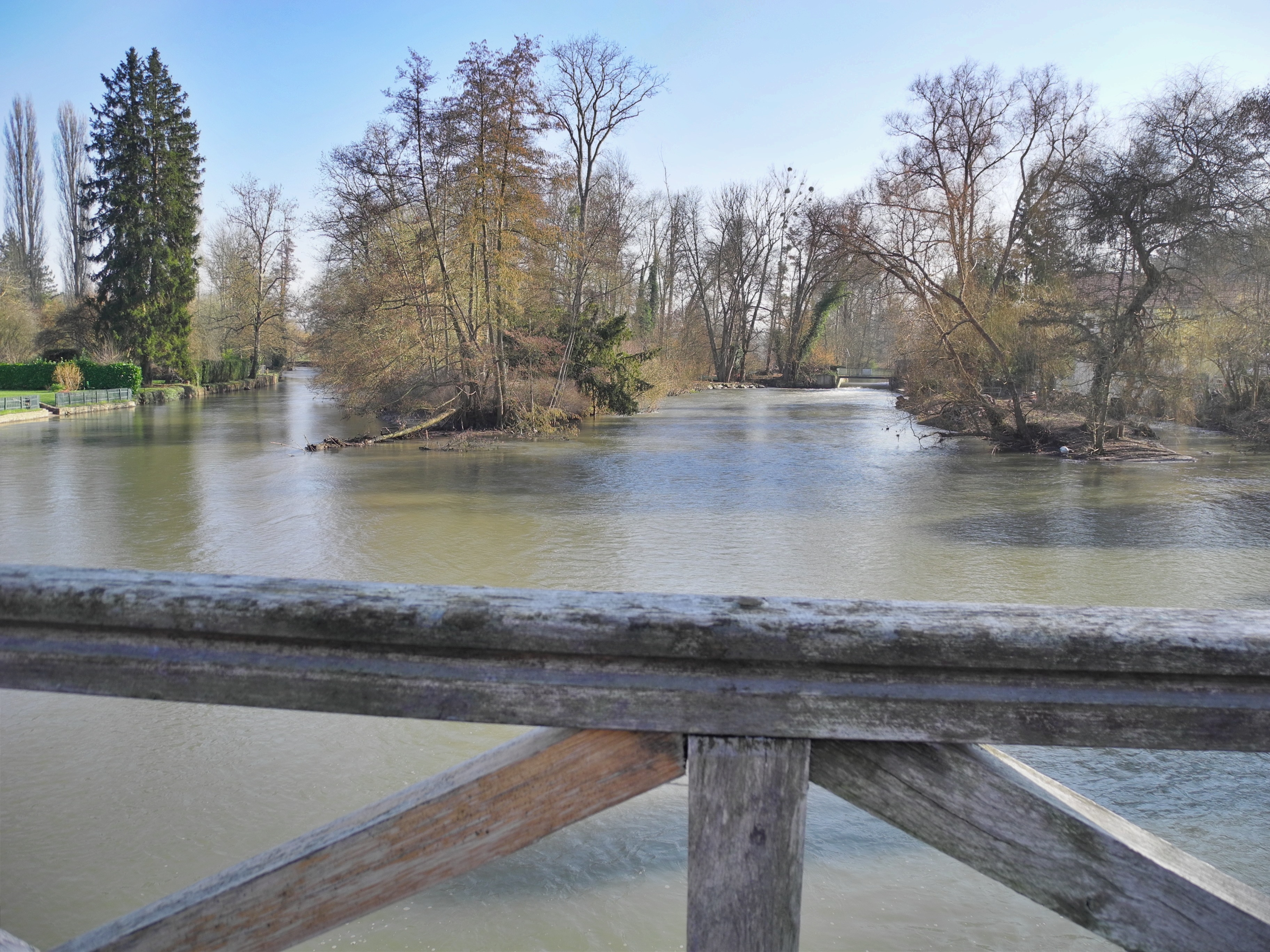 L'Eure en arrivant à Neuilly (Eure)